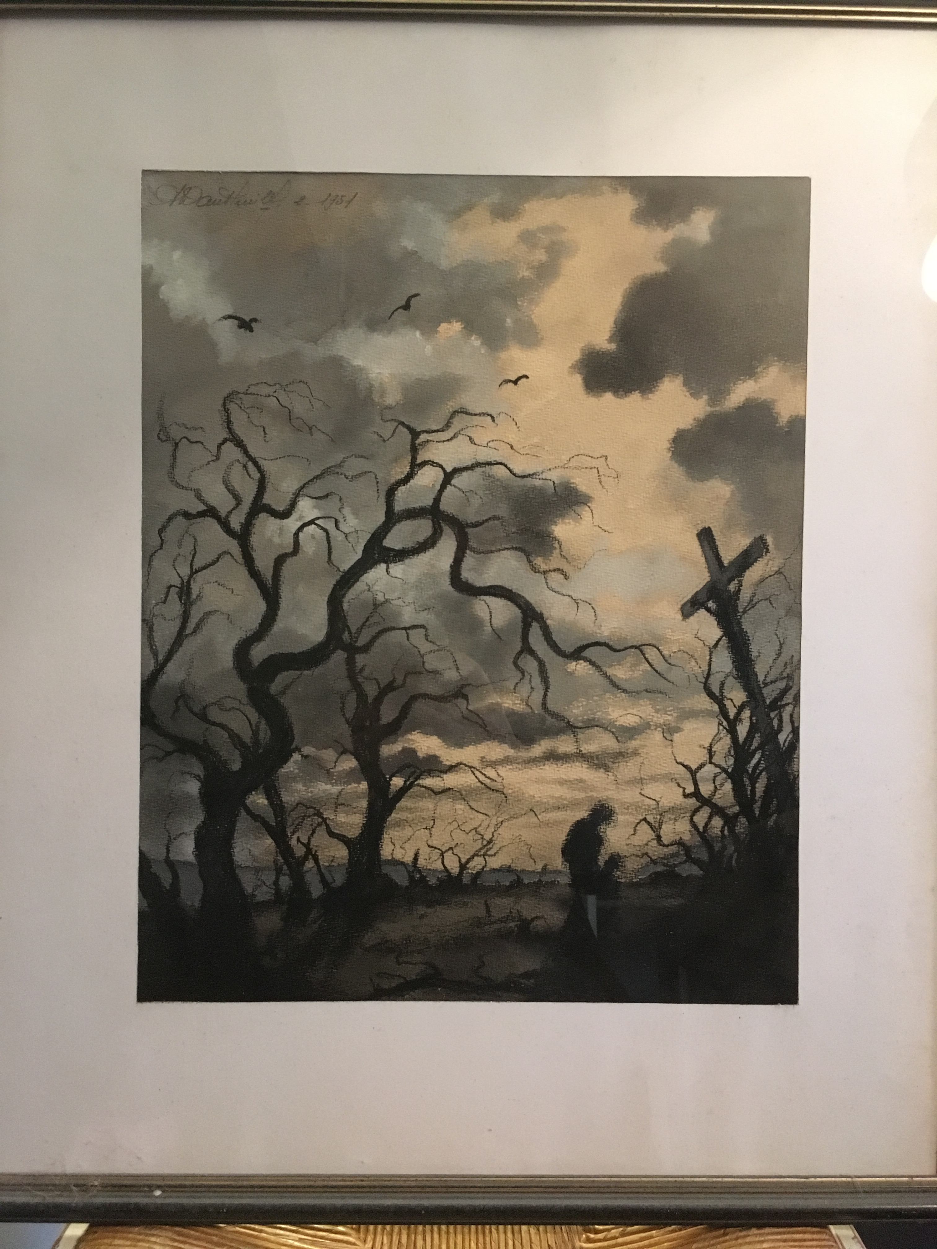 Grand finaliste du prix international de Deauville, 1954